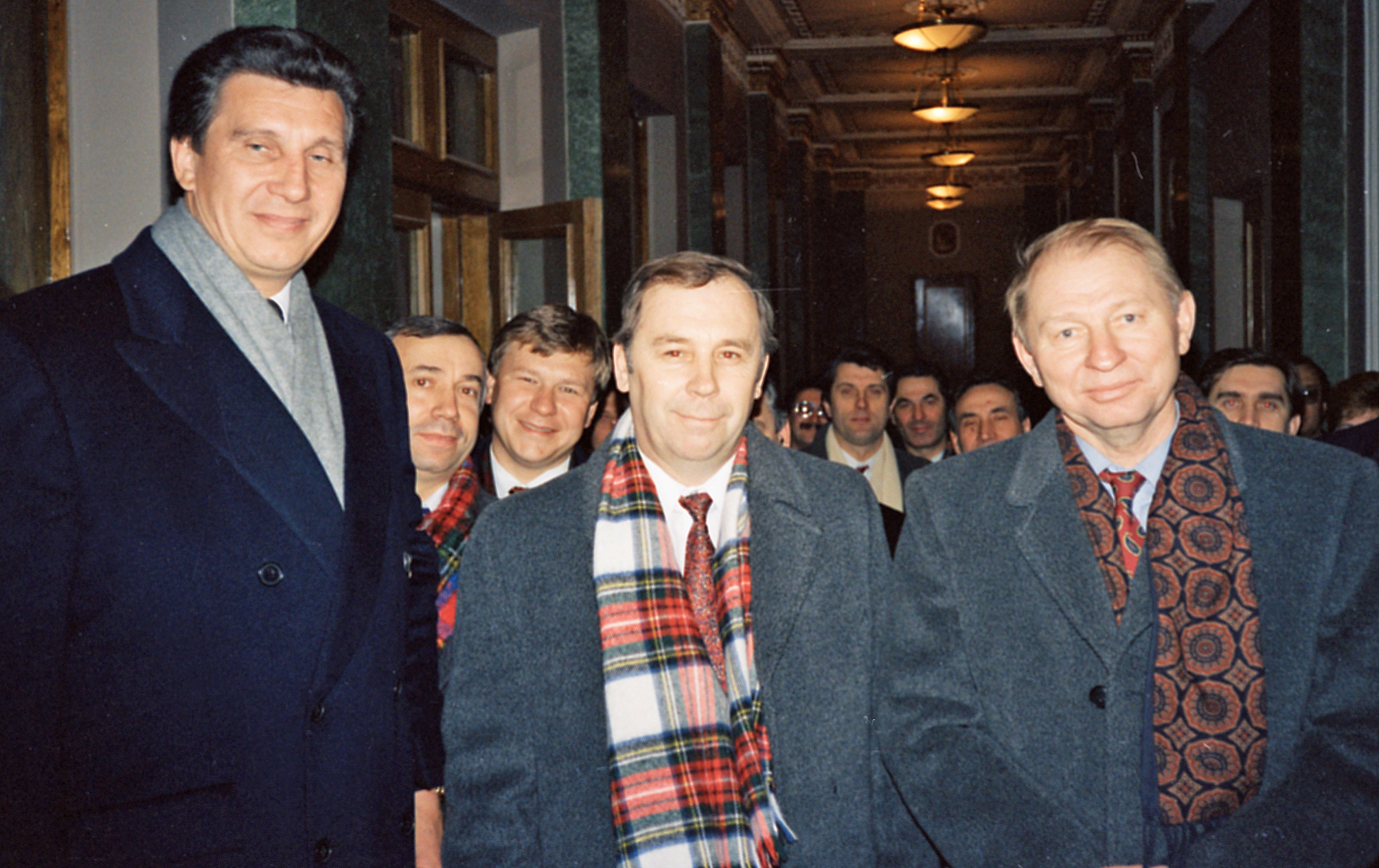 Щербань, Лукьянченко, Пожидаев, Рыбак, вдали Ющенко и Кучма в театр оперы и балета в Донецке